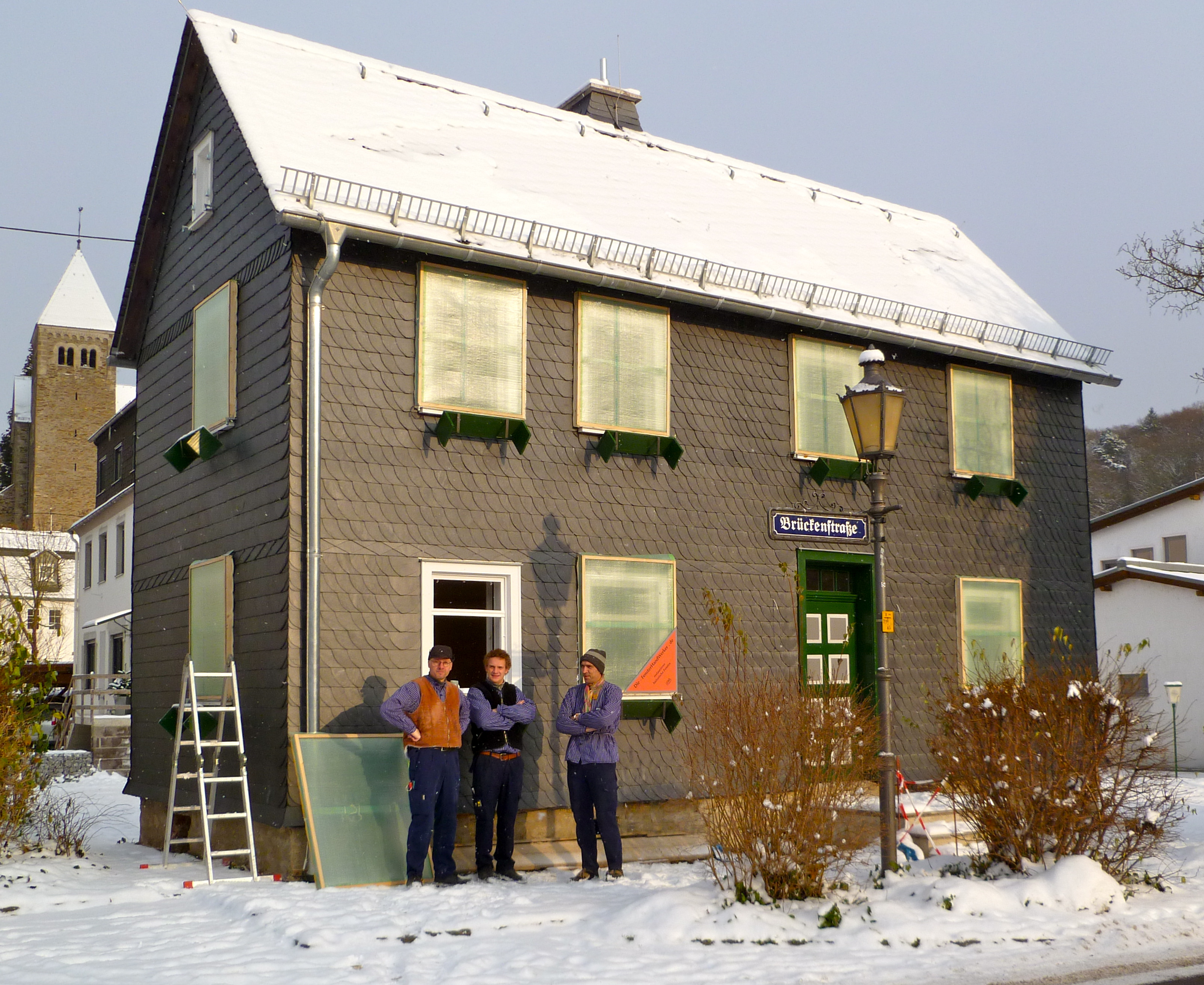 Fensterhandwerker restaurieren historische Fenster auch im Winter.